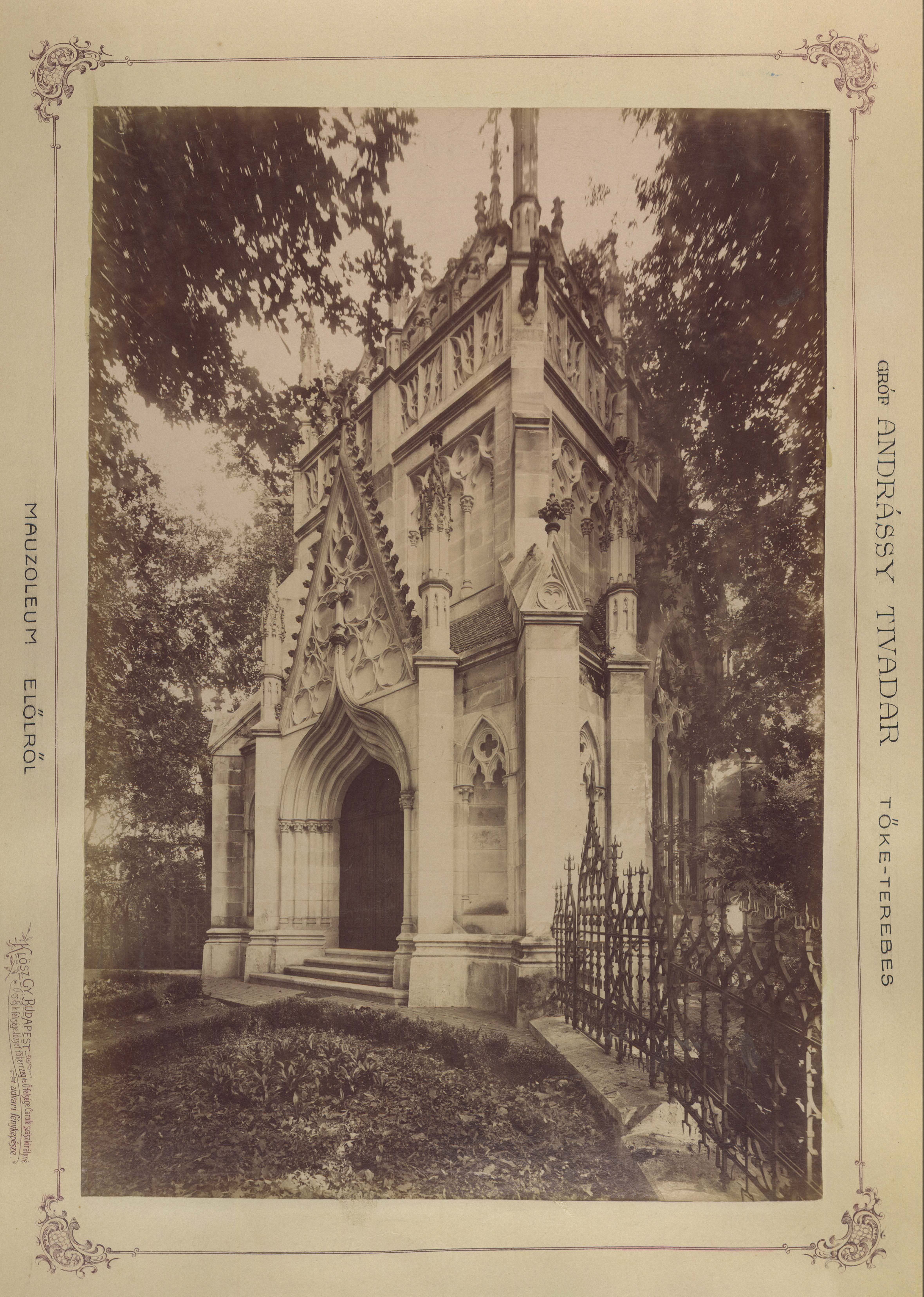 az Andrássy család mauzóleuma. A felvétel 1895-1899 között készült. A kép forrását kérjük így adja meg: Fortepan / Budapest Főváros Levéltára. Levéltári jelzet: HU.BFL.XV.19.d.1.12.186 Location: Hungary, Trebišov Tags: mausoleum Title: az Andrássy család mauzóleuma. A felvétel 1895-1899 között készült. A kép forrását kérjük így adja meg: Fortepan / Budapest Főváros Levéltára. Levéltári jelzet: HU.BFL.XV.19.d.1.12.186